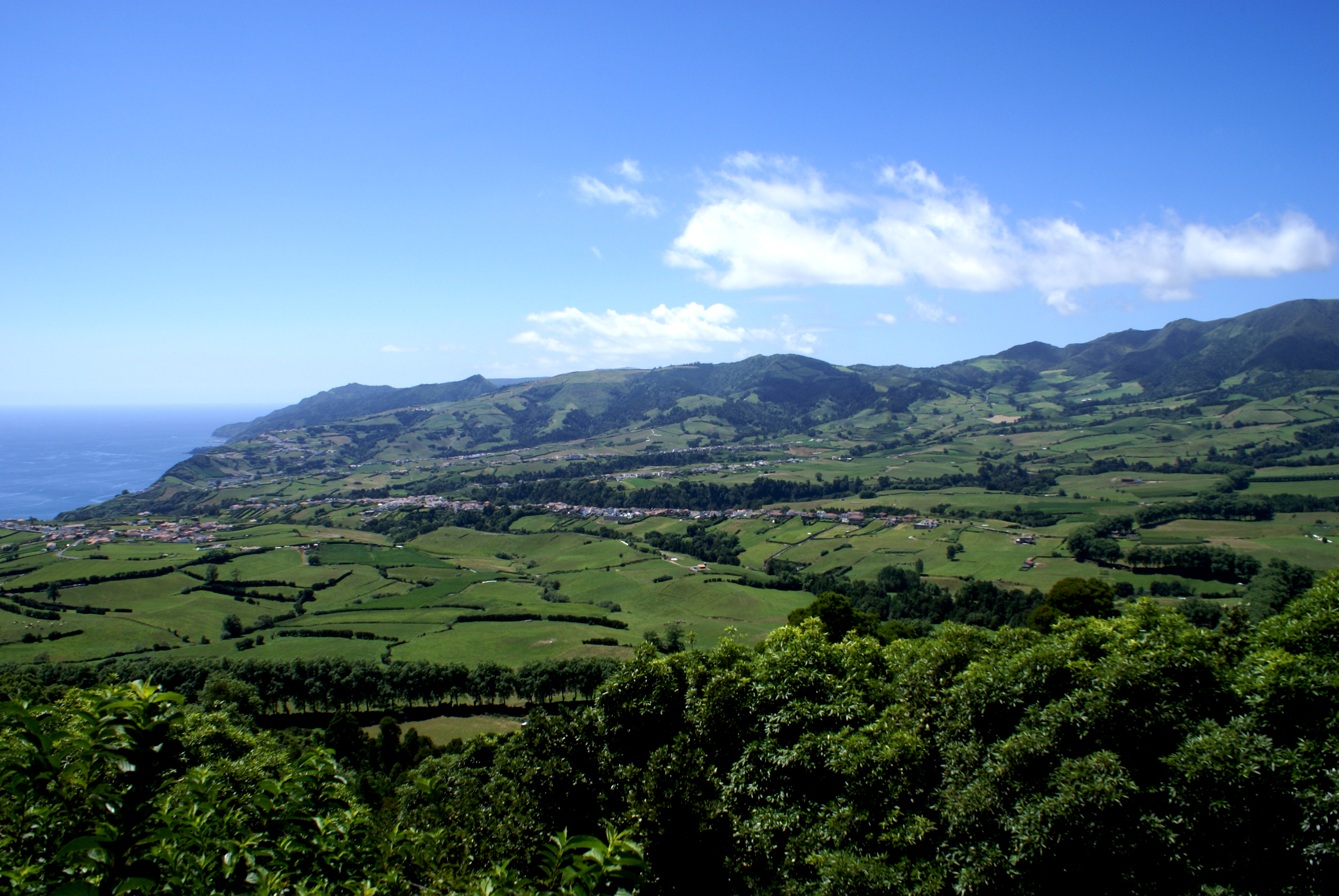 Miradouro do Pico Longo, Povoação, ilha de São Miguel, Açores